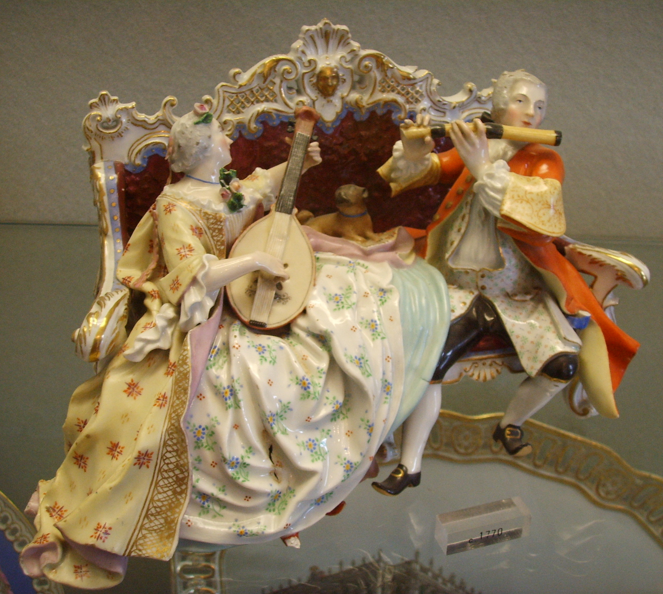 Museo delle porcellane di Firenze, manifattura tedesca, statuina